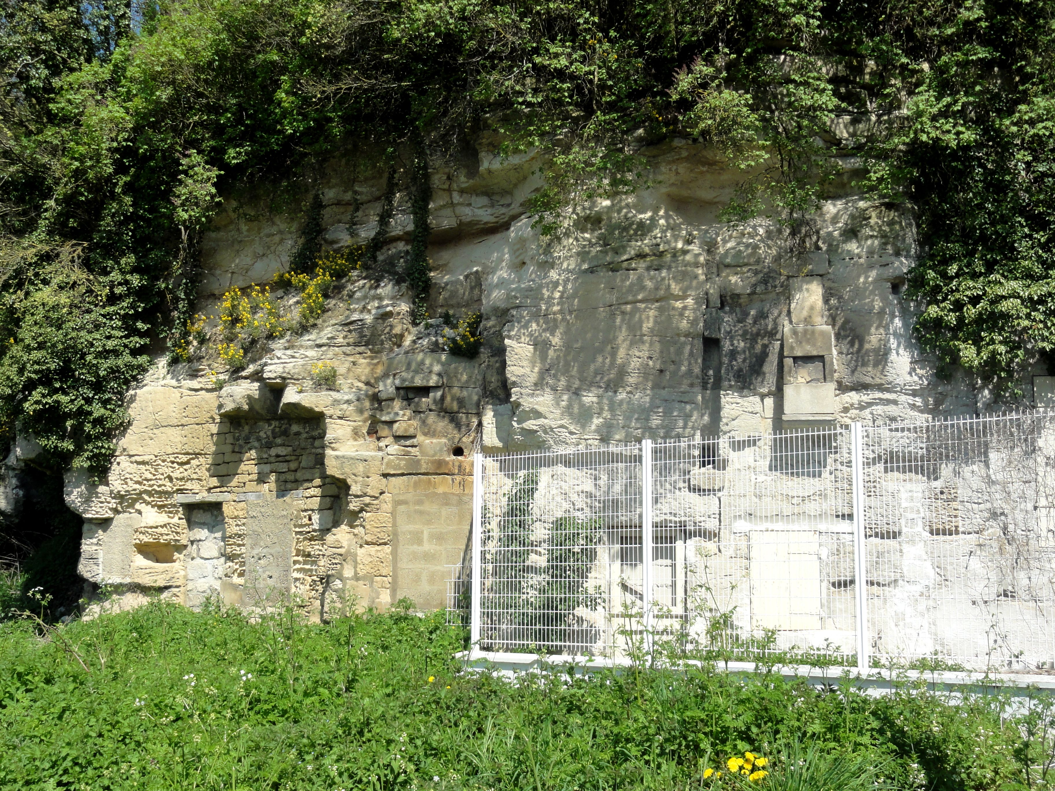 Ancienne maison troglodyte dite caverne de Bernard l'Ermite, rue de l'Église.